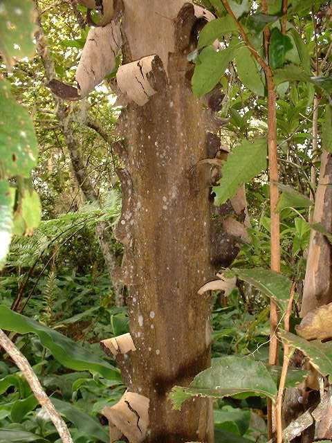 Aphloia theiformis, change écorce, tronc, La Réunion